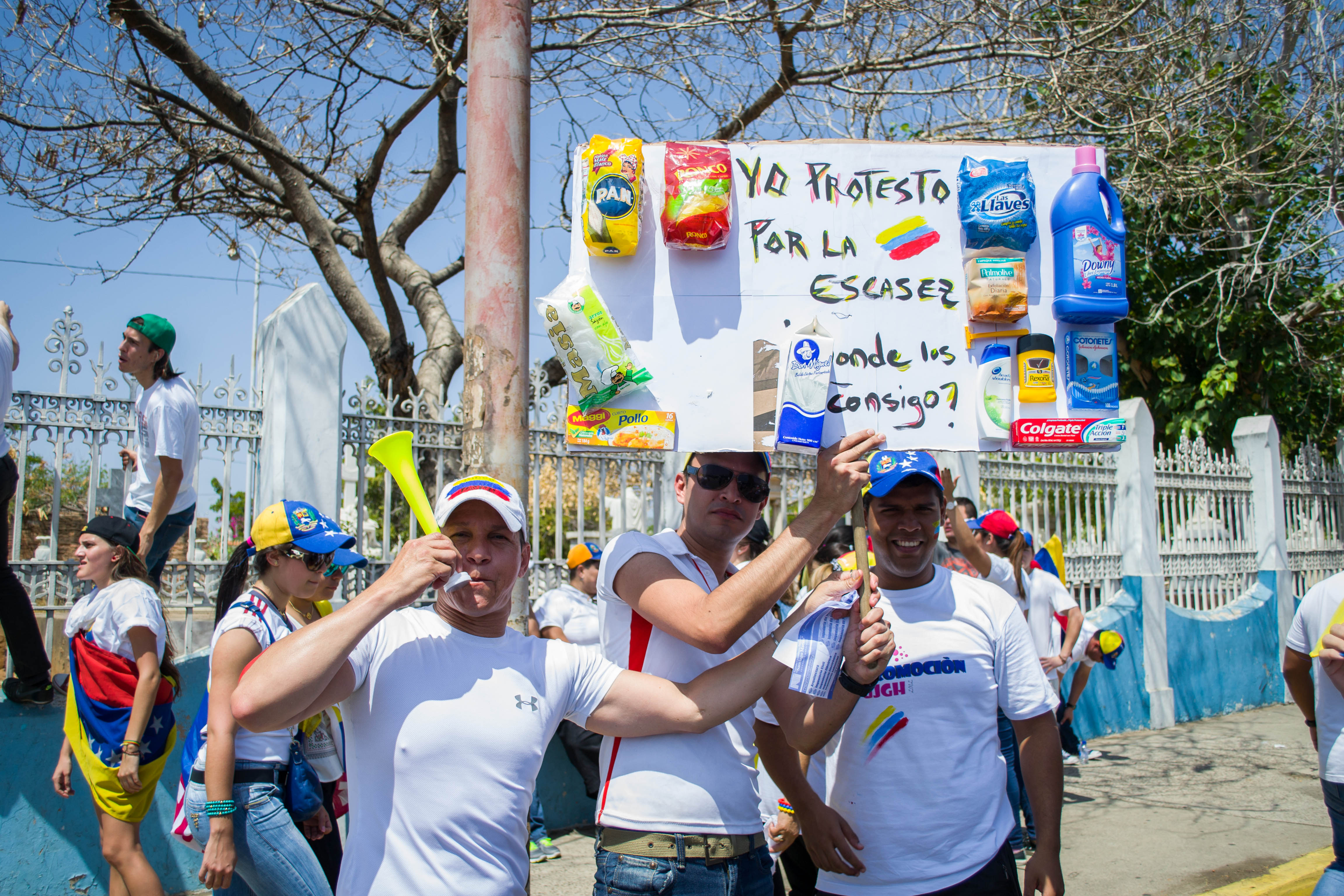 La gente de la oposición marchó pacíficamente hasta las inmediaciones del Palacio de Justicia de la ciudad de Maracaibo.